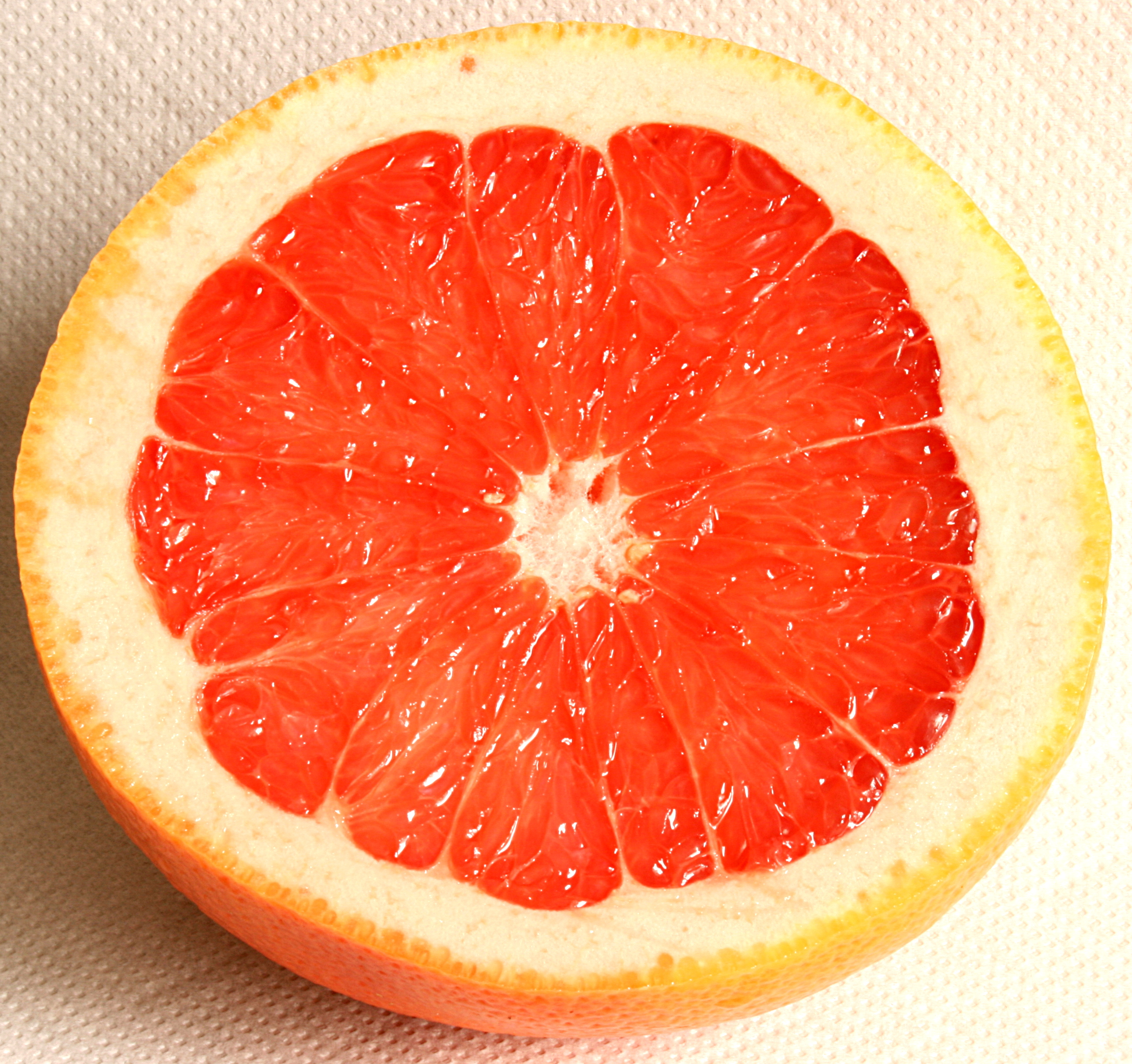 Grapefruit Schnitt rose Zypern